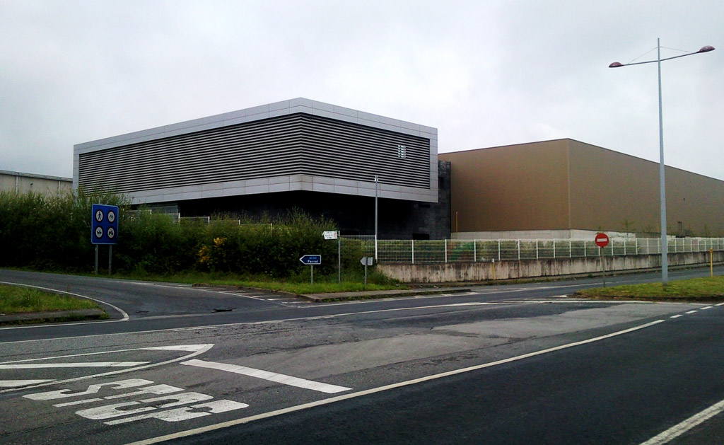 Sede de Cándido Hermida no polígono de Río do Pozo, Narón, A Coruña